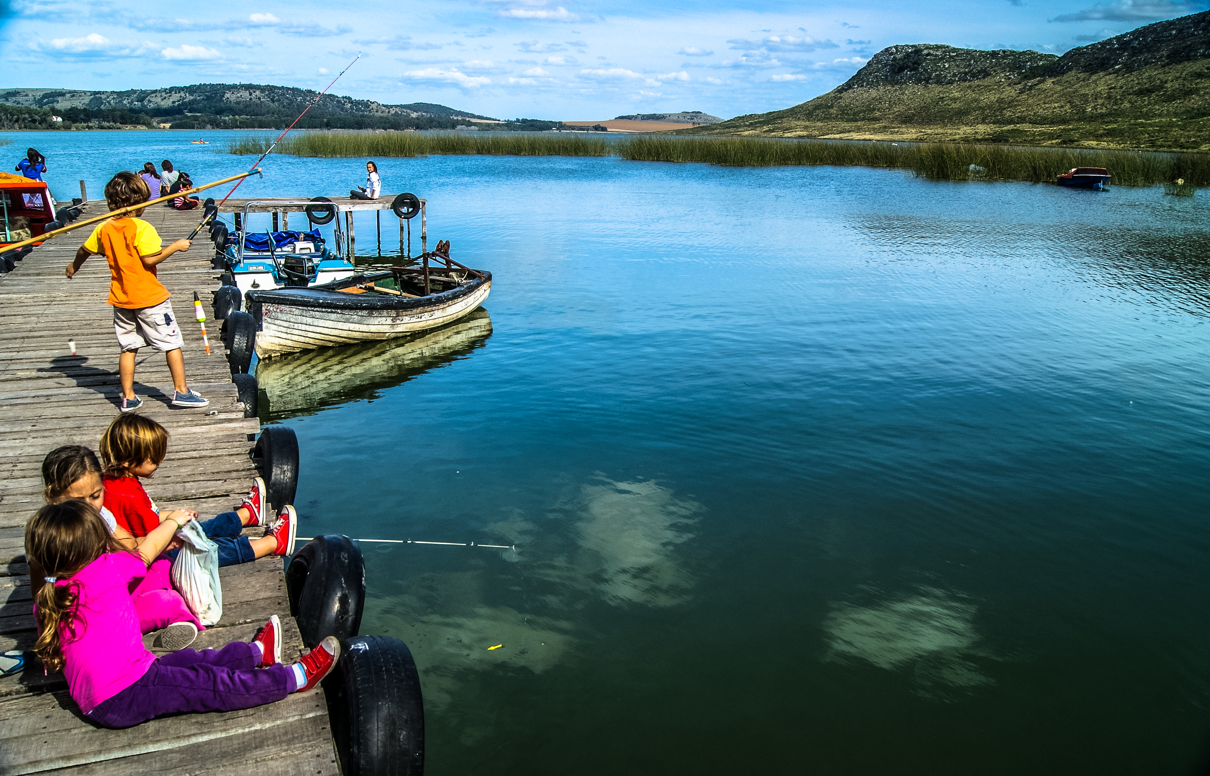 La laguna Brava es un espejo de agua de unas 500 hectáreas cuya profundidad oscila entre los 4 y los 6 metros. Actividades de Pesca, Camping y paseos en vote.